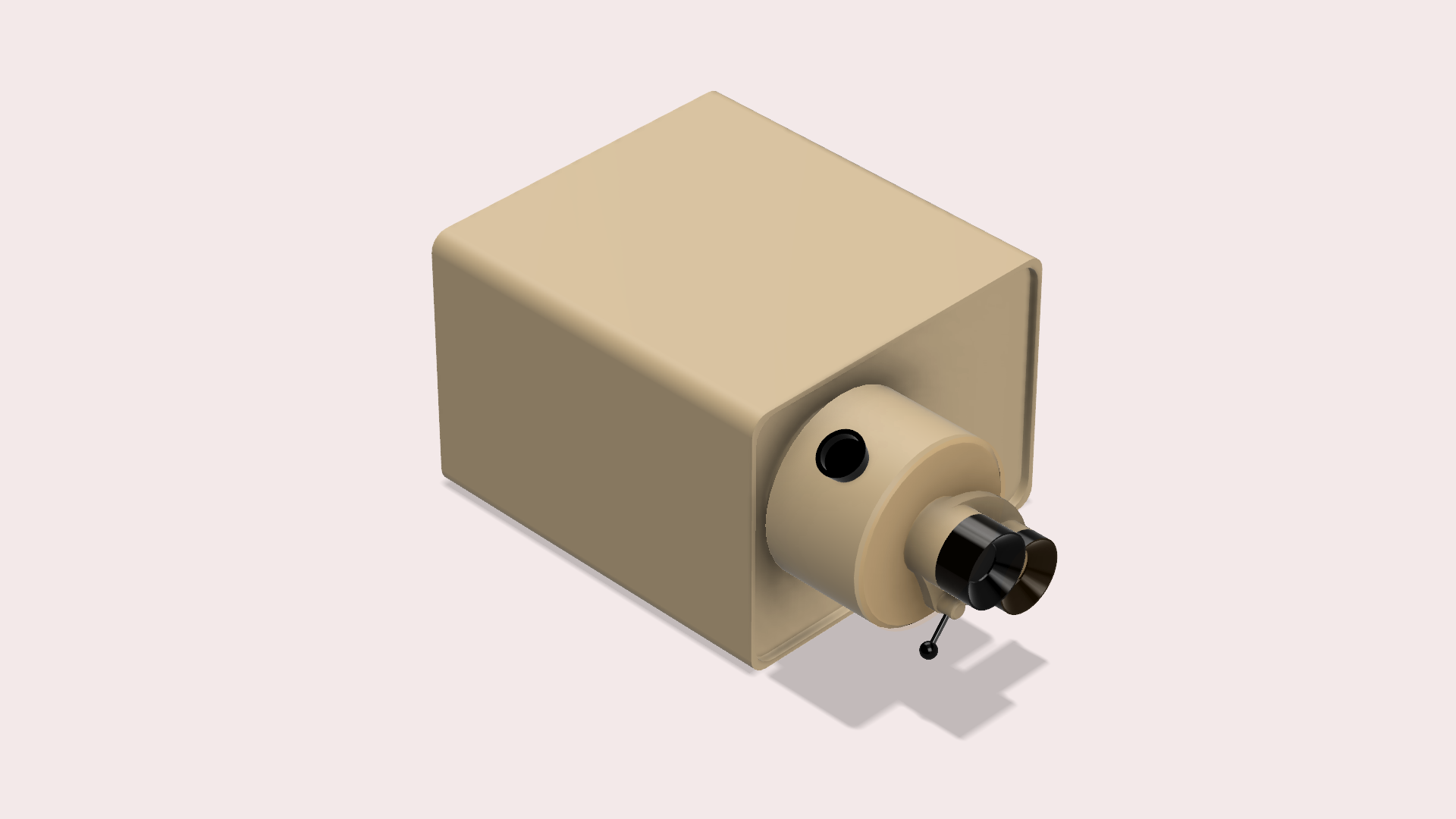 Das ist eine 3D-Abbildung des Tritest L3 Testgeräts, das beim Lanterntest nach Beyne zum Einsatz kommt. Angefertigt wurde dieses Modell mit Autodesk Fusion 360 mit Original-Fotoaufnahmen des Testgeräts als Vorbild.